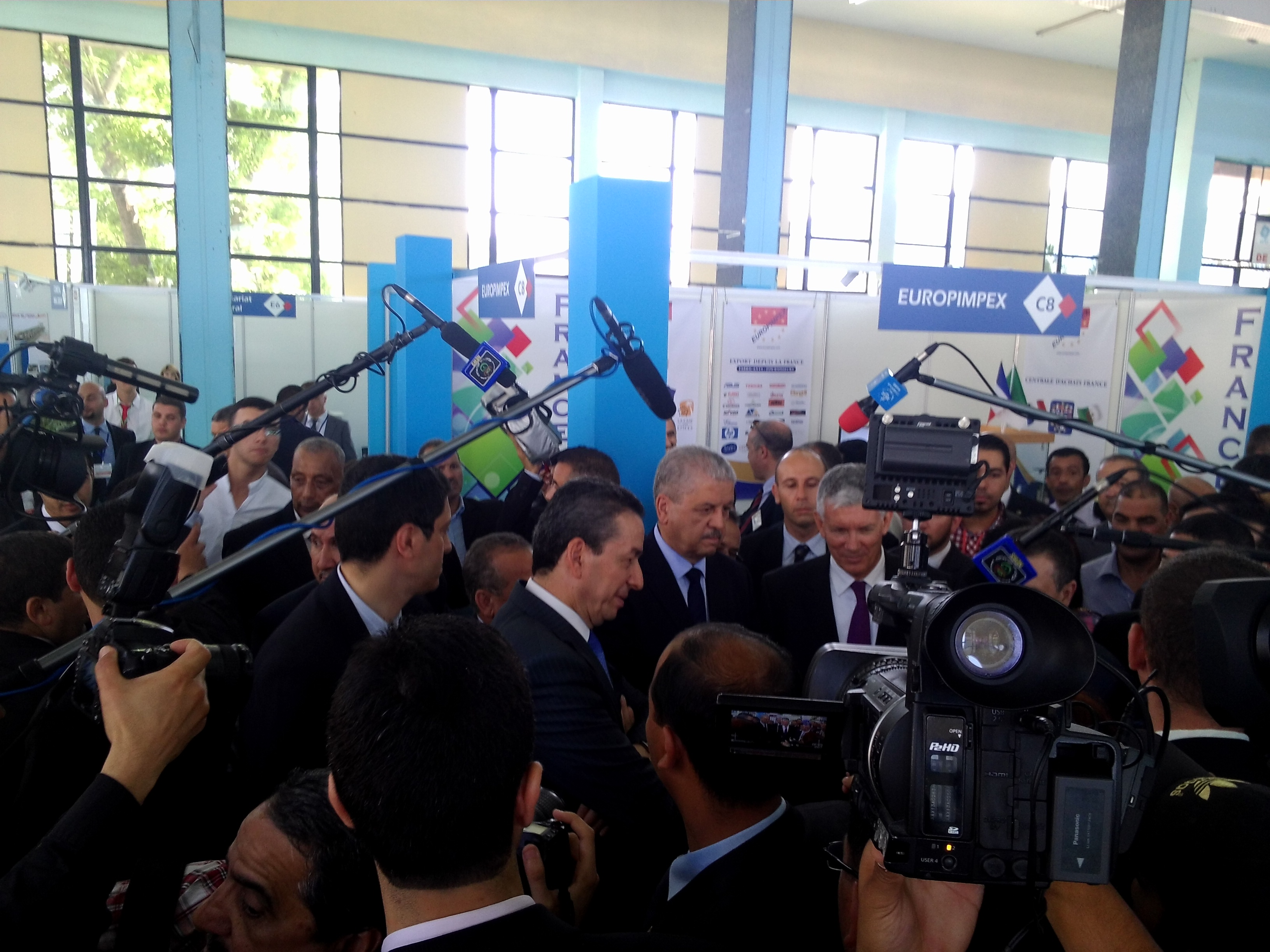 Прем'єр-міністр Алжиру Абдельмалек Селляль